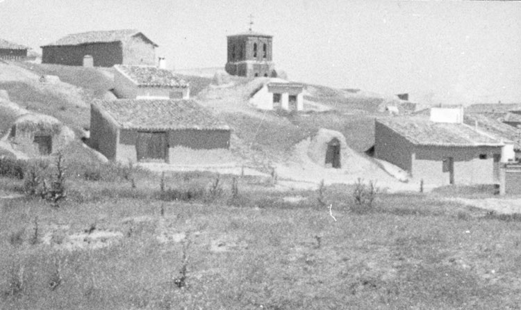 Iglesia - Herrín de Campos (Valladolid) - Álbum 200 x 140 - Fotografía. Papel 105 x 60 B/N